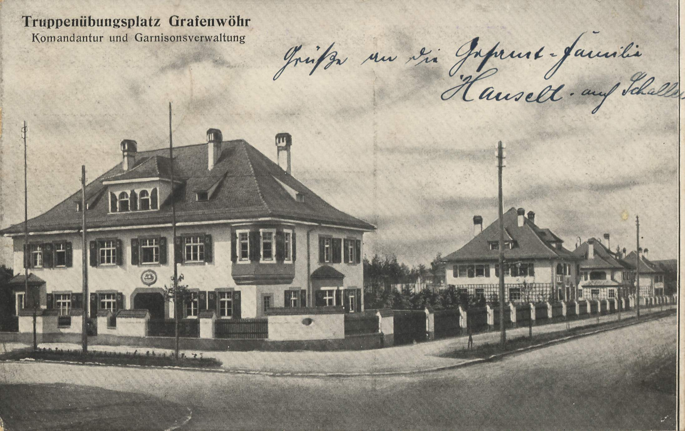 Truppenübungsplatz Grafenwöhr. Kommandantur und Garnisonsverwaltung.